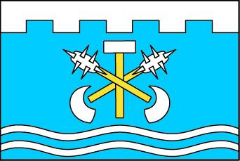 Kolomuty vlajka